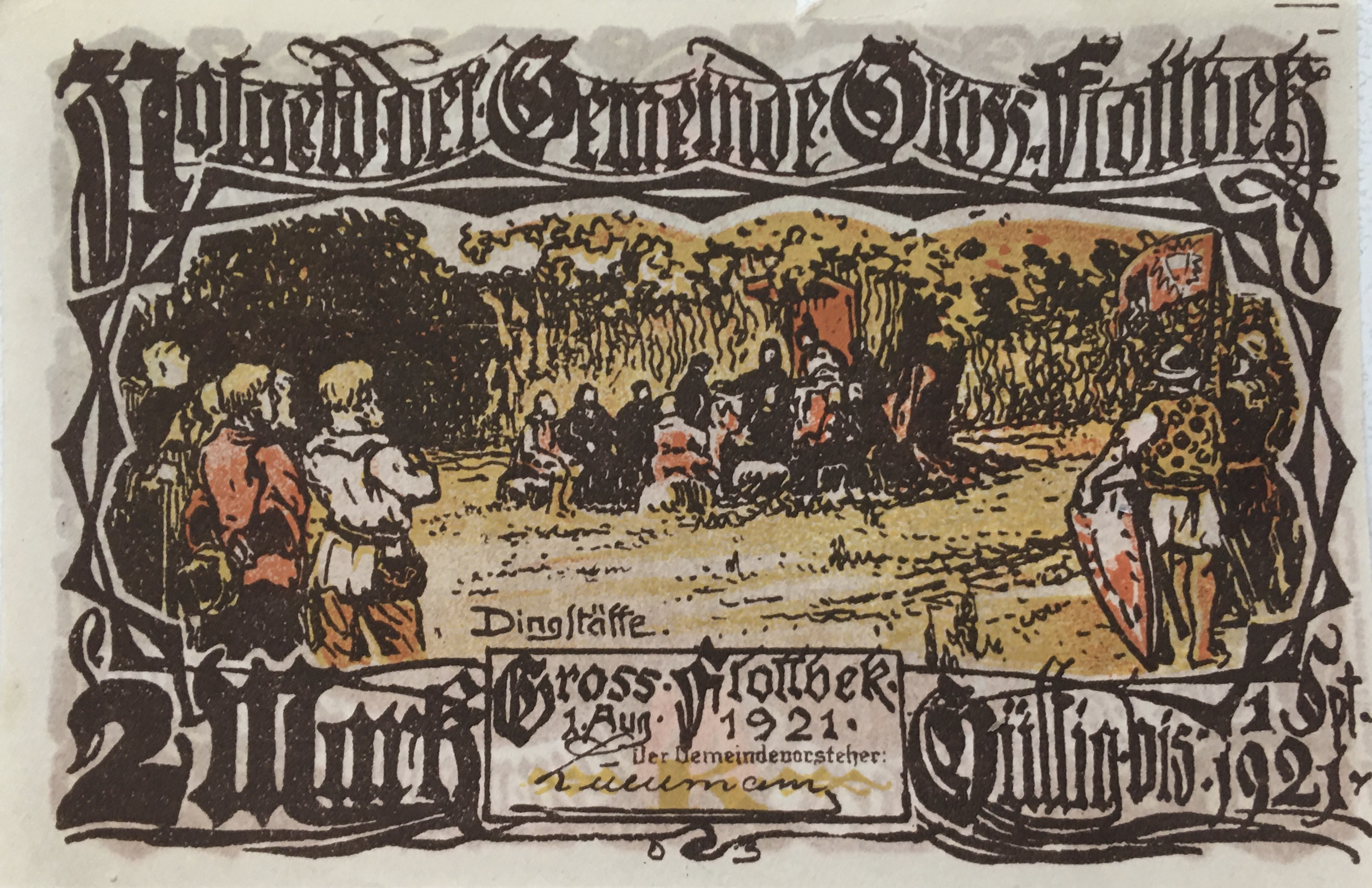 Notgeld der Gemeinde Hamburg-Groß Flottbek erinnert an alte Dingstätte